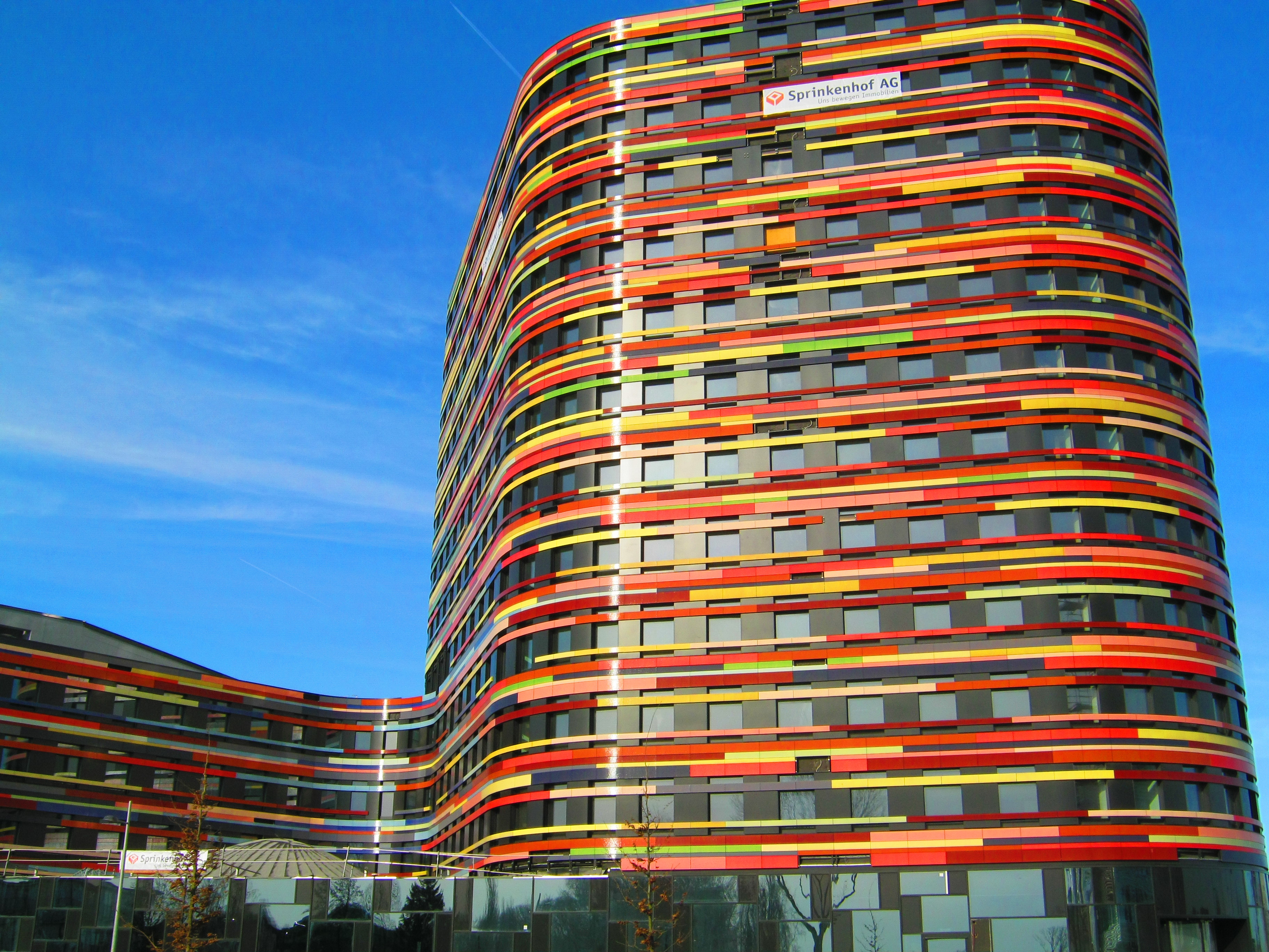 Neubau der Behörde für Stadtentwicklung und Umwelt (BSU) auf der IBA 2013 in Hamburg.